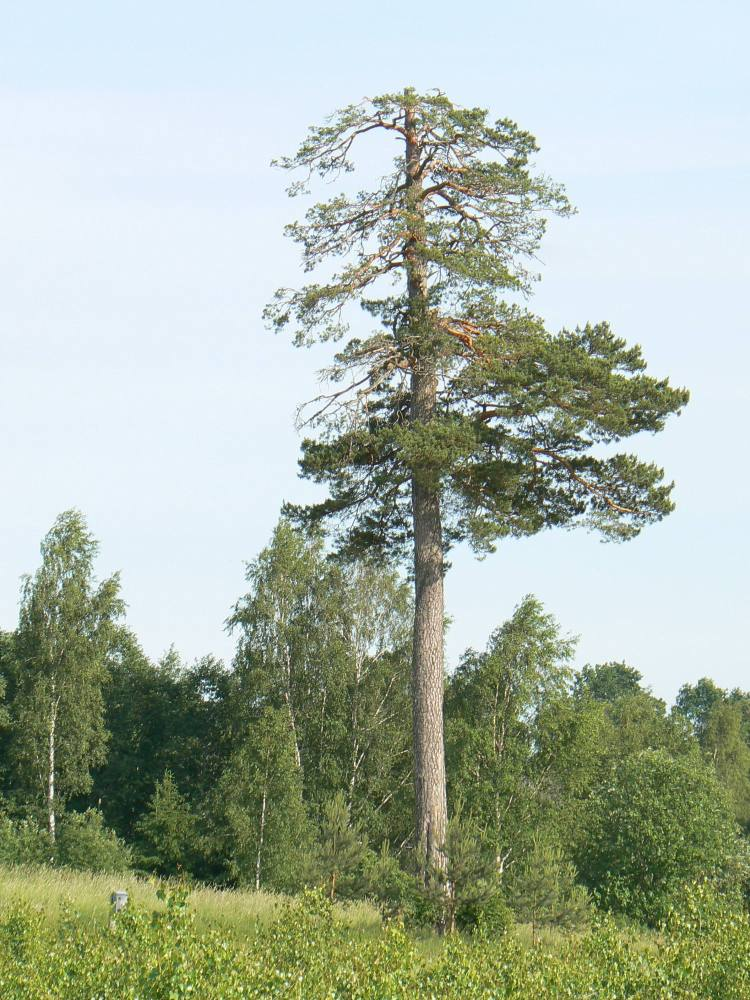 Liiva mänd